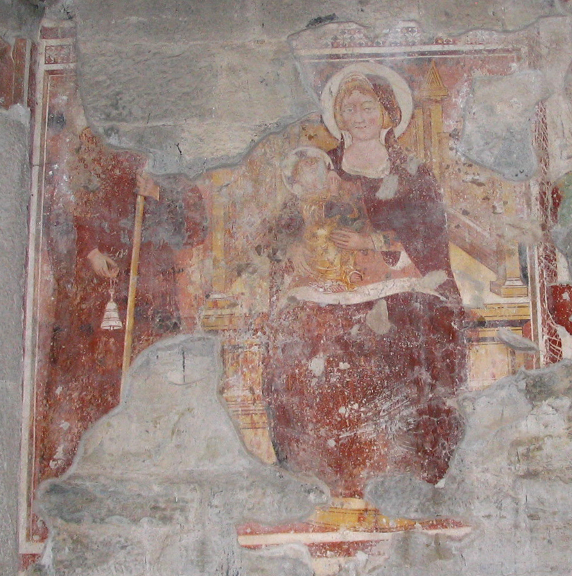 Madonna in trono, affresco di incerta attribuzione, forse della scuola del cosiddetto "Maestro del 1388". Chiesa di San Giorgio in Lemine (ad Almenno San Salvatore, Bergamo). Fotografia di Giorces.